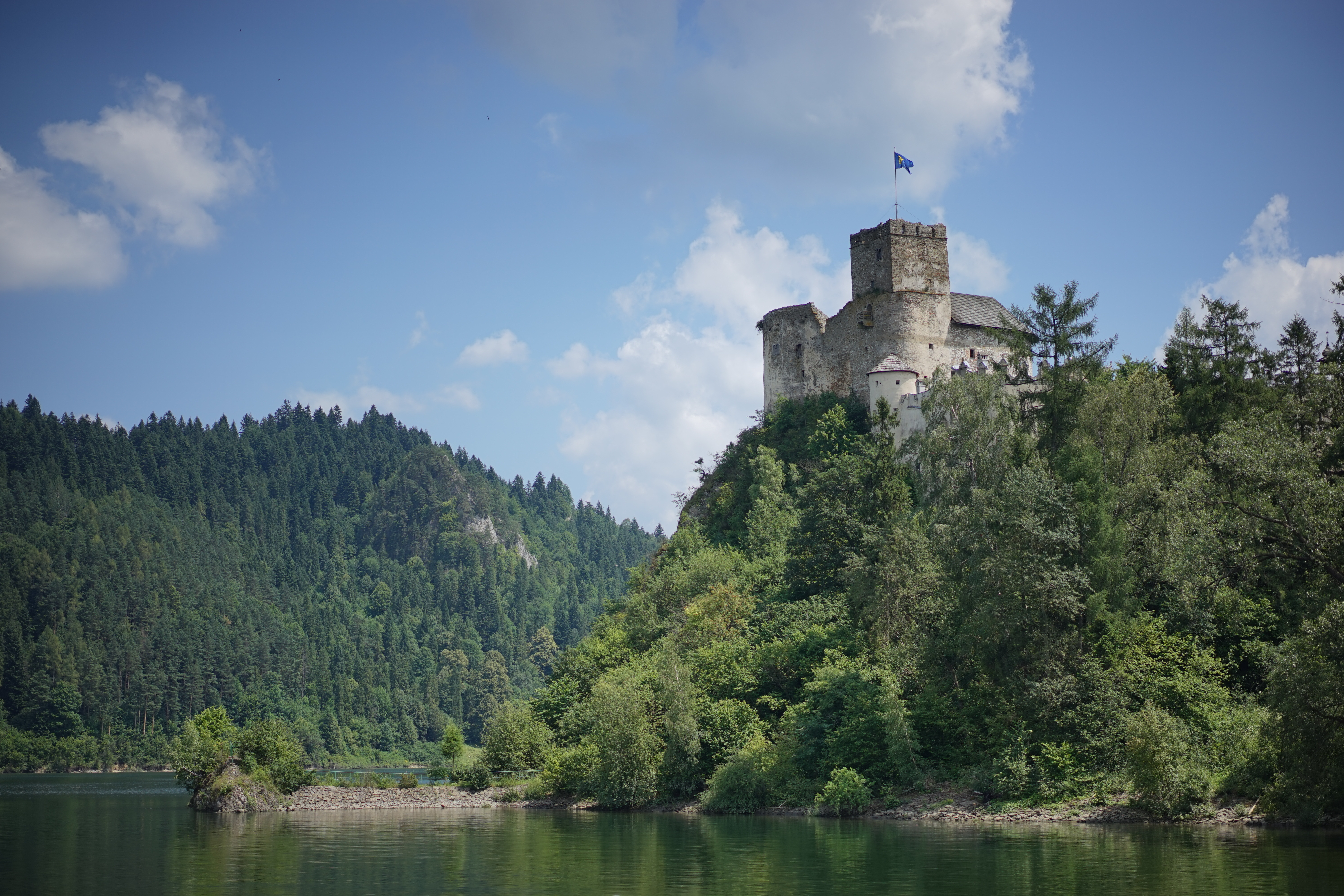 Niedzica, zespół zamku